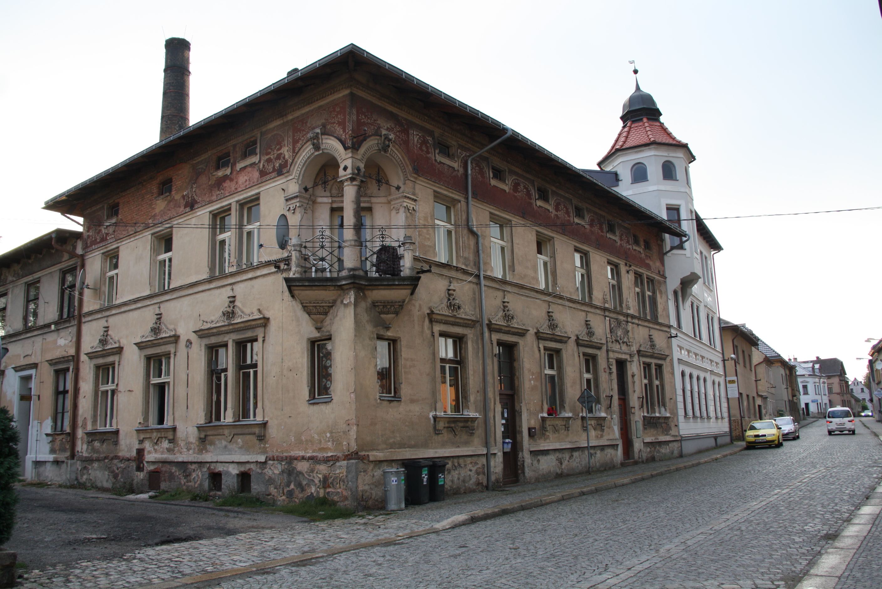 Městský dům (Hodkovice nad Mohelkou), Liberecká 41, Hodkovice nad Mohelkou, Hodkovice nad Mohelkou.